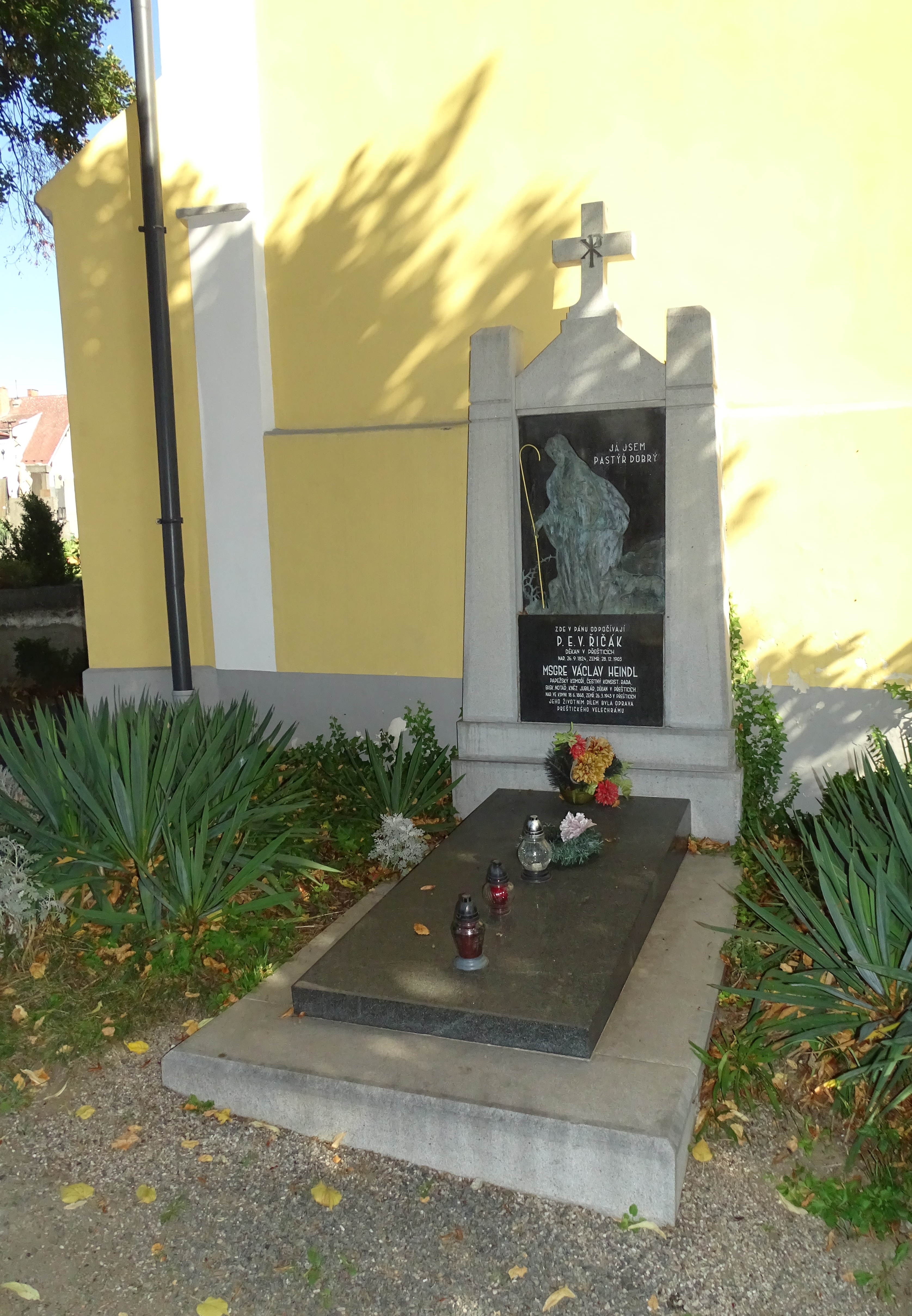 Hrob děkana P. E. V. Řičáka a Msgre. Václava Heindla za kaplí Povýšení sv. Kříže na hřbitově v Přešticích .